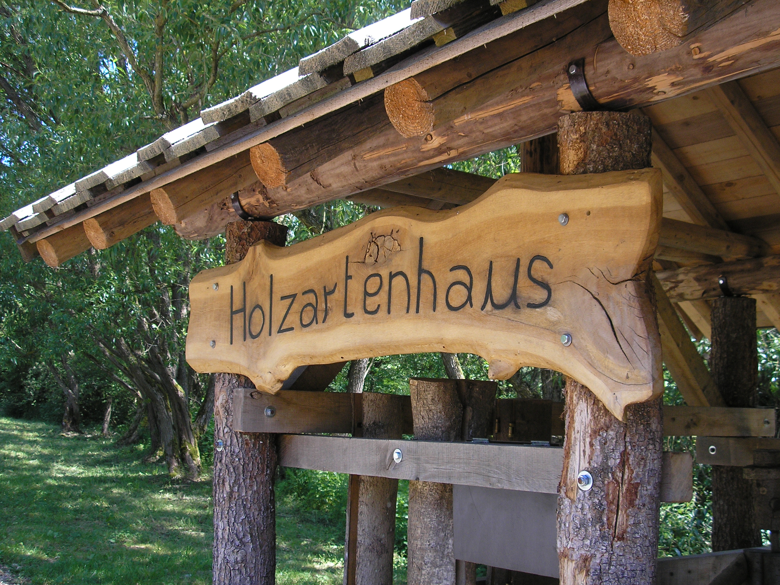 Amel, East Belgium